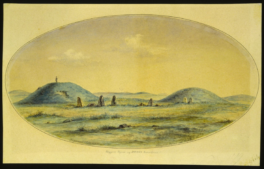 Akvarel af Magnus Petersen, 5 sept. 1871: Kleggumhøjene ved Bække. Anst Herred, Ribe Amt.